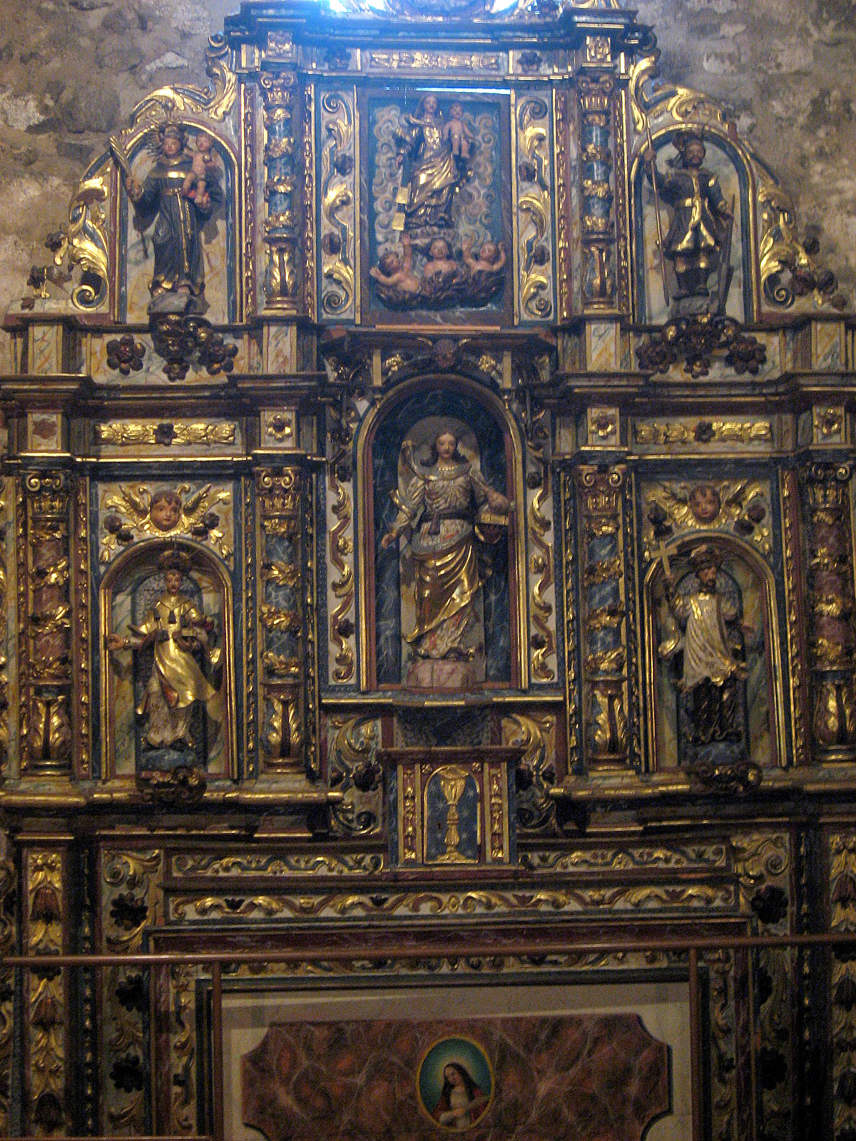 Retaule de l'església de Santa Coloma